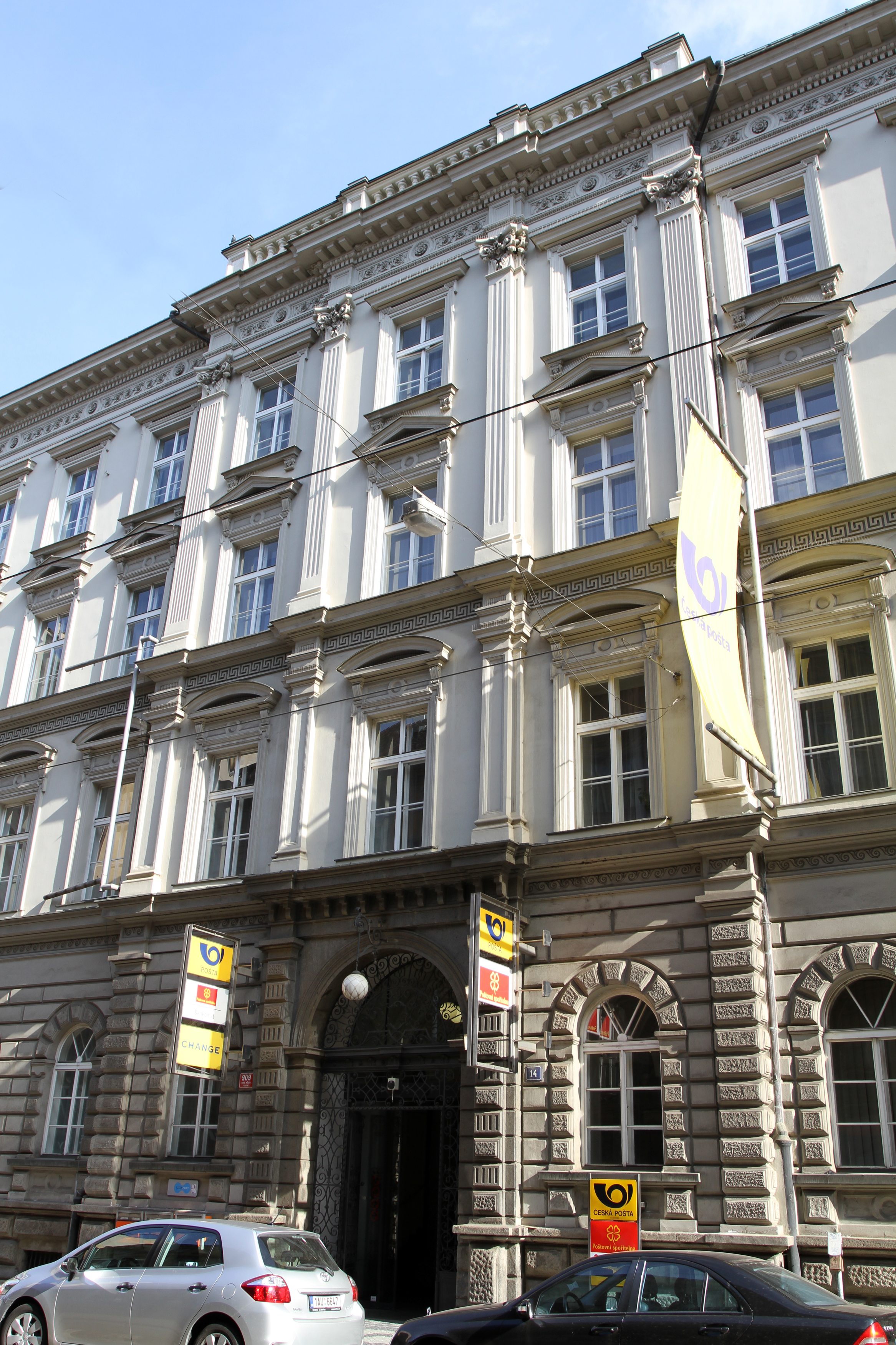 Hlavní pošta (Nové Město), Praha 1, Jindřišská, Politických vězňů 909, Nové Město